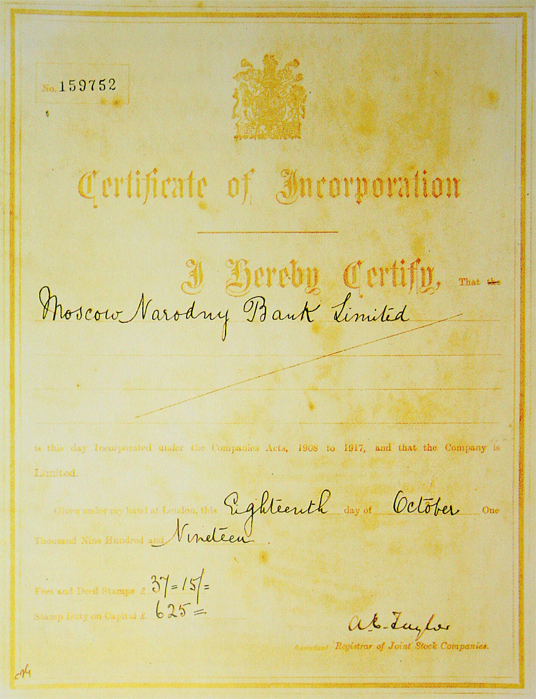 Сертификат о регистрации MNB в качестве английской компании №159752.